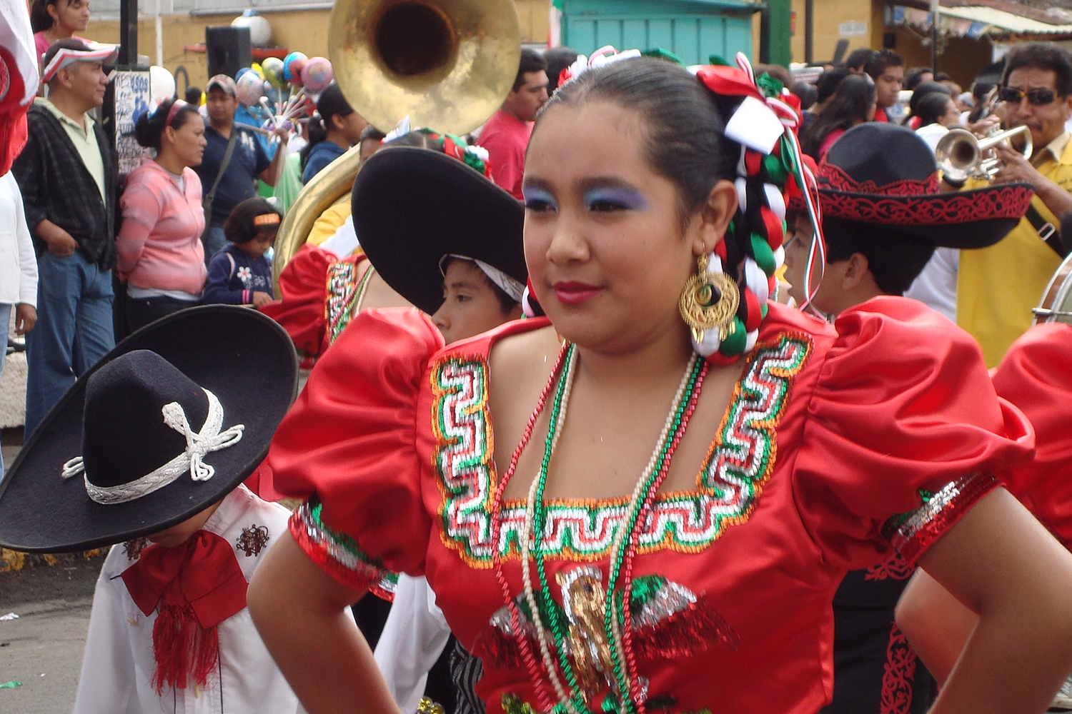 Esta joven está ataviada con un conjunto propio de las chinas de la Comparsa de Charros de Tláhuac. El vestido está confeccionado en raso y lleva aplicaciones de lentejuela. Desfile del 16 de septiembre de 2010 en San Pedro Tláhuac (D. F., México)